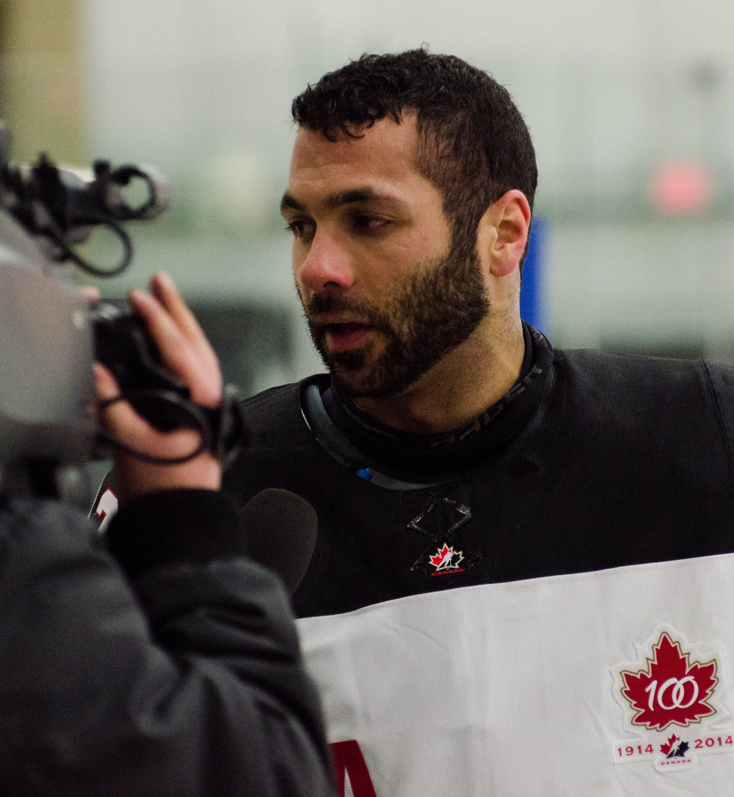 Kieran Block, 2015